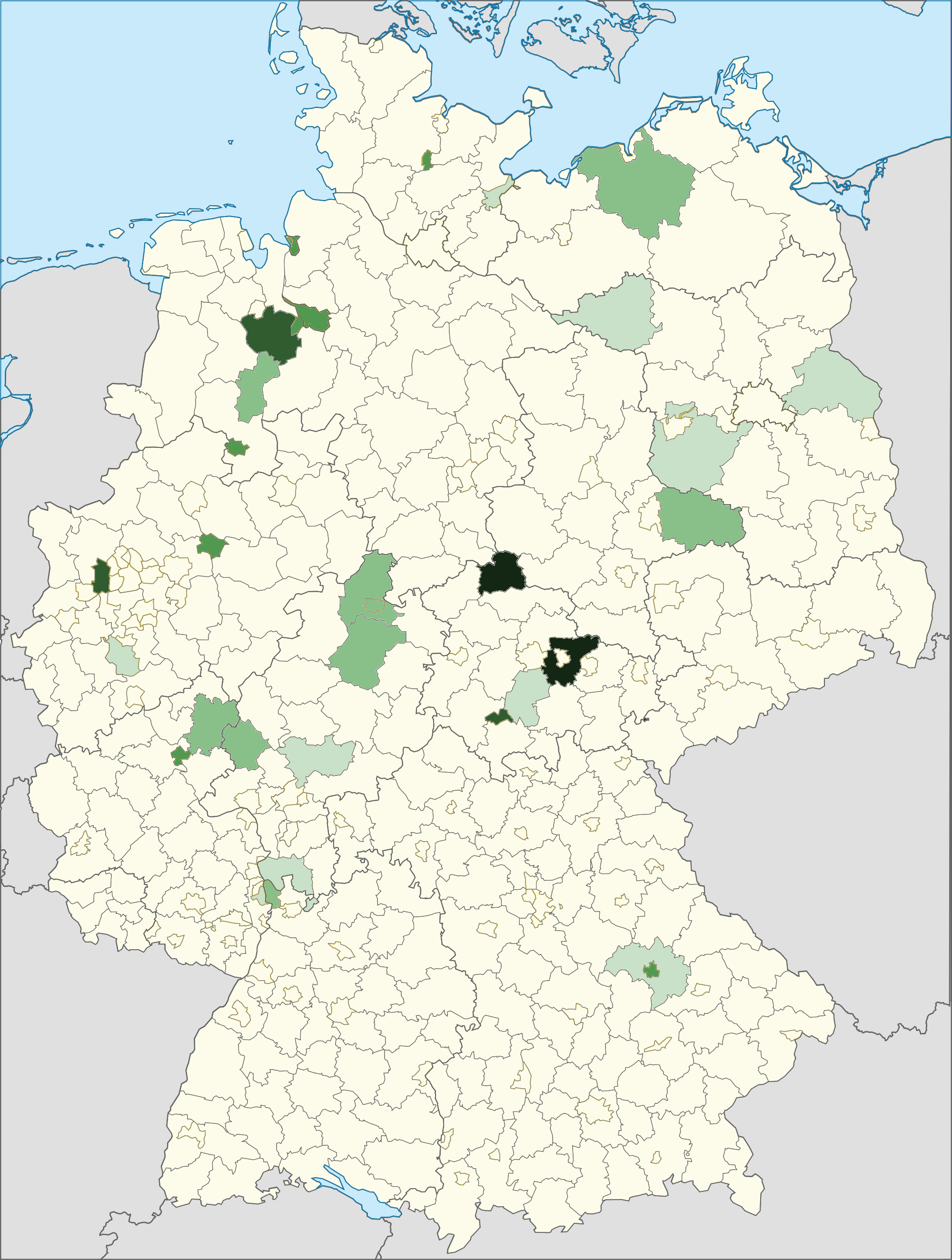 Karte der Personen mit bulgarischer Staatsangehörigkeit und deren relativer Häufigkeit in den Landkreisen 2014. Dunkelgrün: häufigste ausländische Staatsangehörigkeit in diesem Kreis, hellgrün: fünfthäufigste ausländische Staatsangehörigkeit in diesem Kreis, weiß: sechsthäufig oder weniger. Quelle: Ausländerzentralregister, Stand 31. Dezember 2014. Saarland: keine Daten auf Kreisebene (dargestellt ist die Landesebene). Deutschlandweite relative Häufigkeit der ausländischen Staatsangehörigkeit Bulgarien: Platz 10.